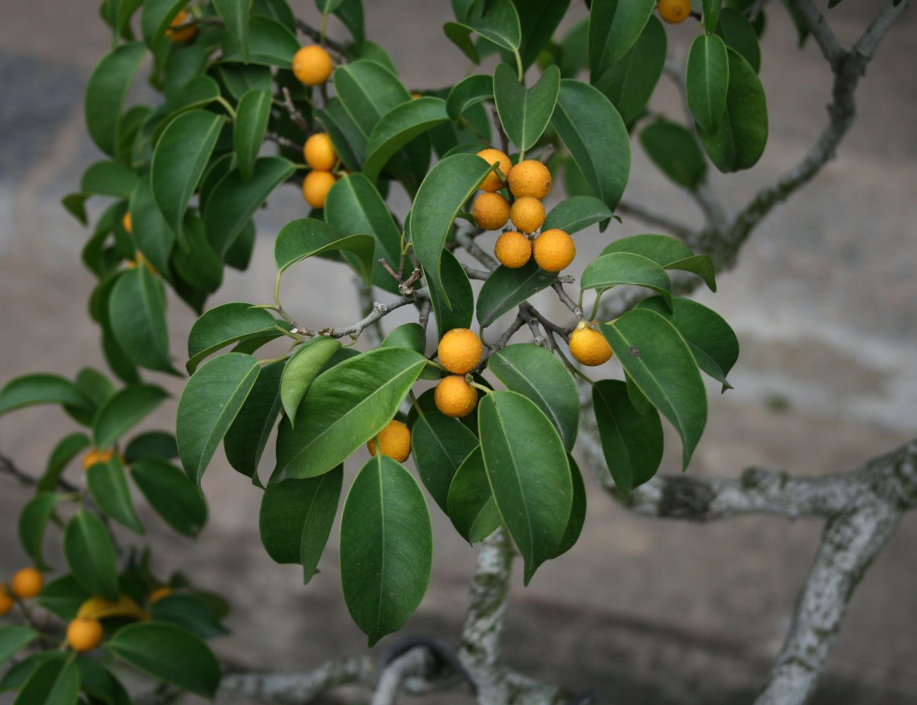 Ficus benjamina, Maulbeergewächse (Moraceae) - Vietnam/Việt Nam: Hanoi/Hà Nội, Literaturtempel/Văn Miếu - Quốc Tử Giám